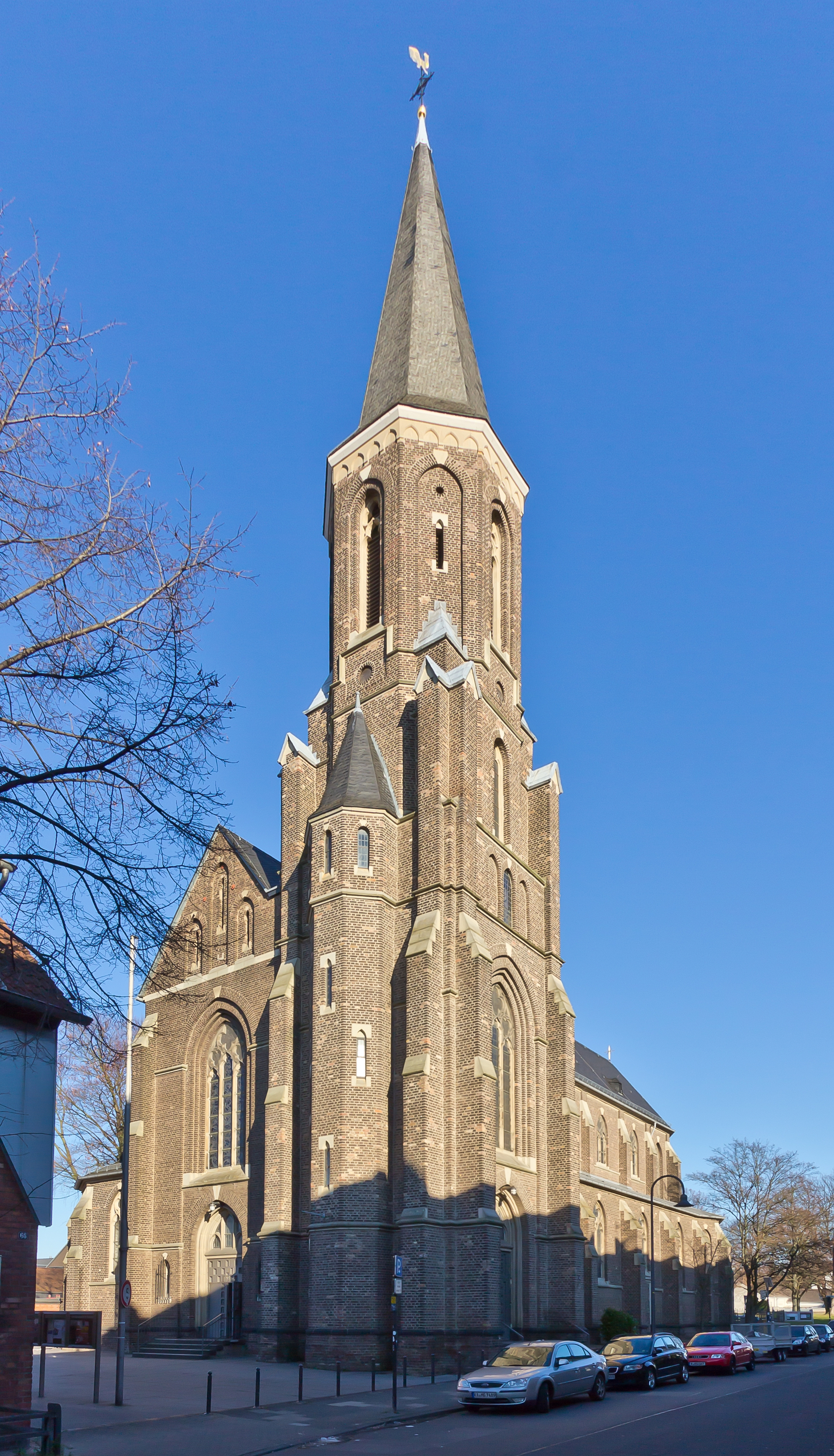 Denkmalgeschützte Kirche St. Dionysius, Longericher Hauptstr. 62, Köln